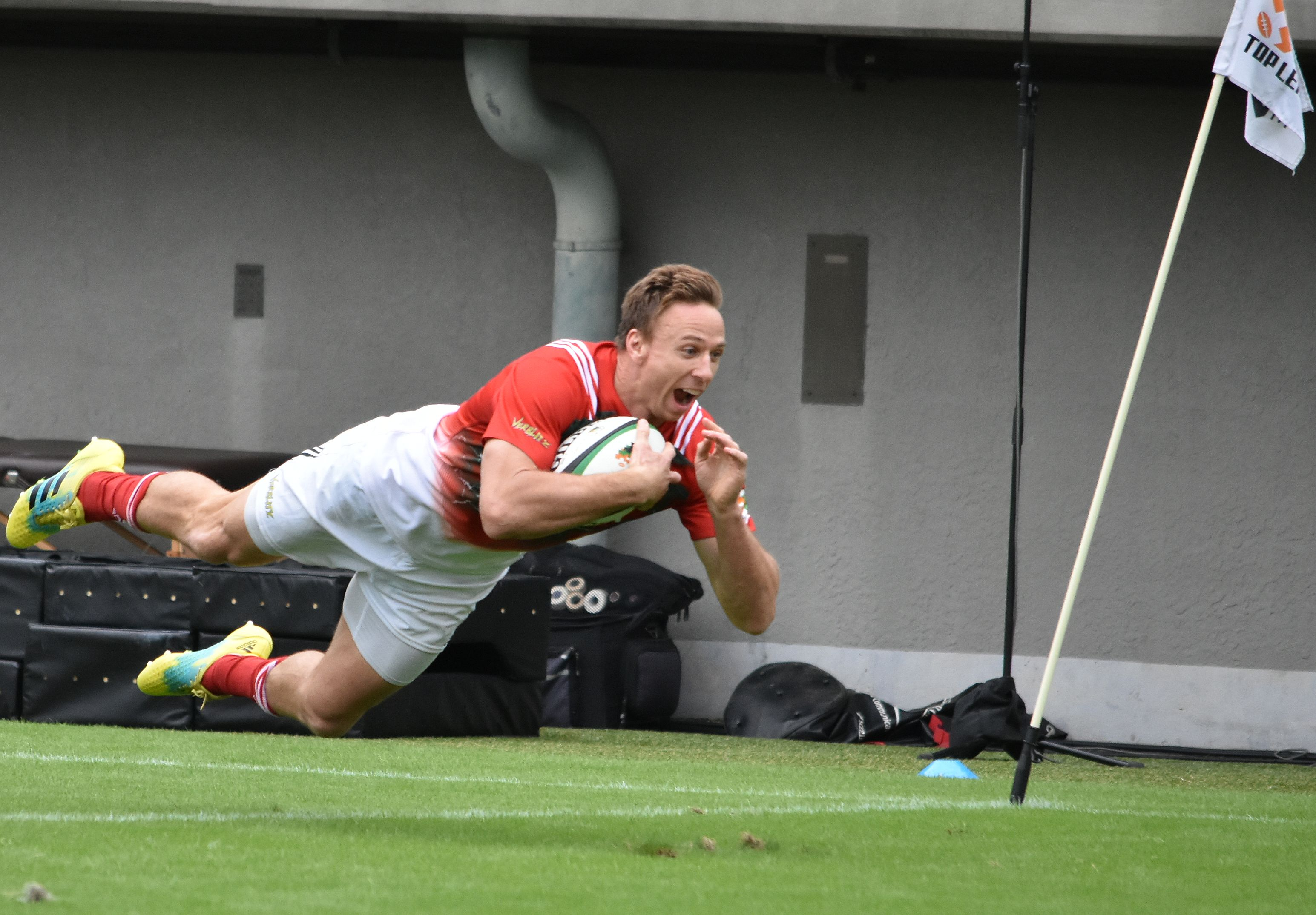 イェーツ・スティーブン